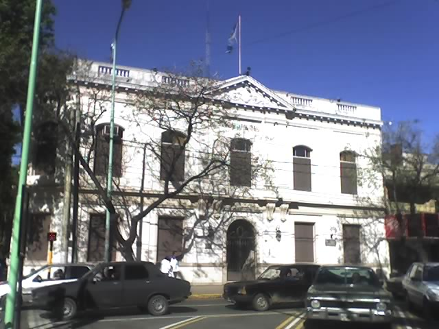 Palacio Municipal de Merlo, Provincia de Buenos Aires.